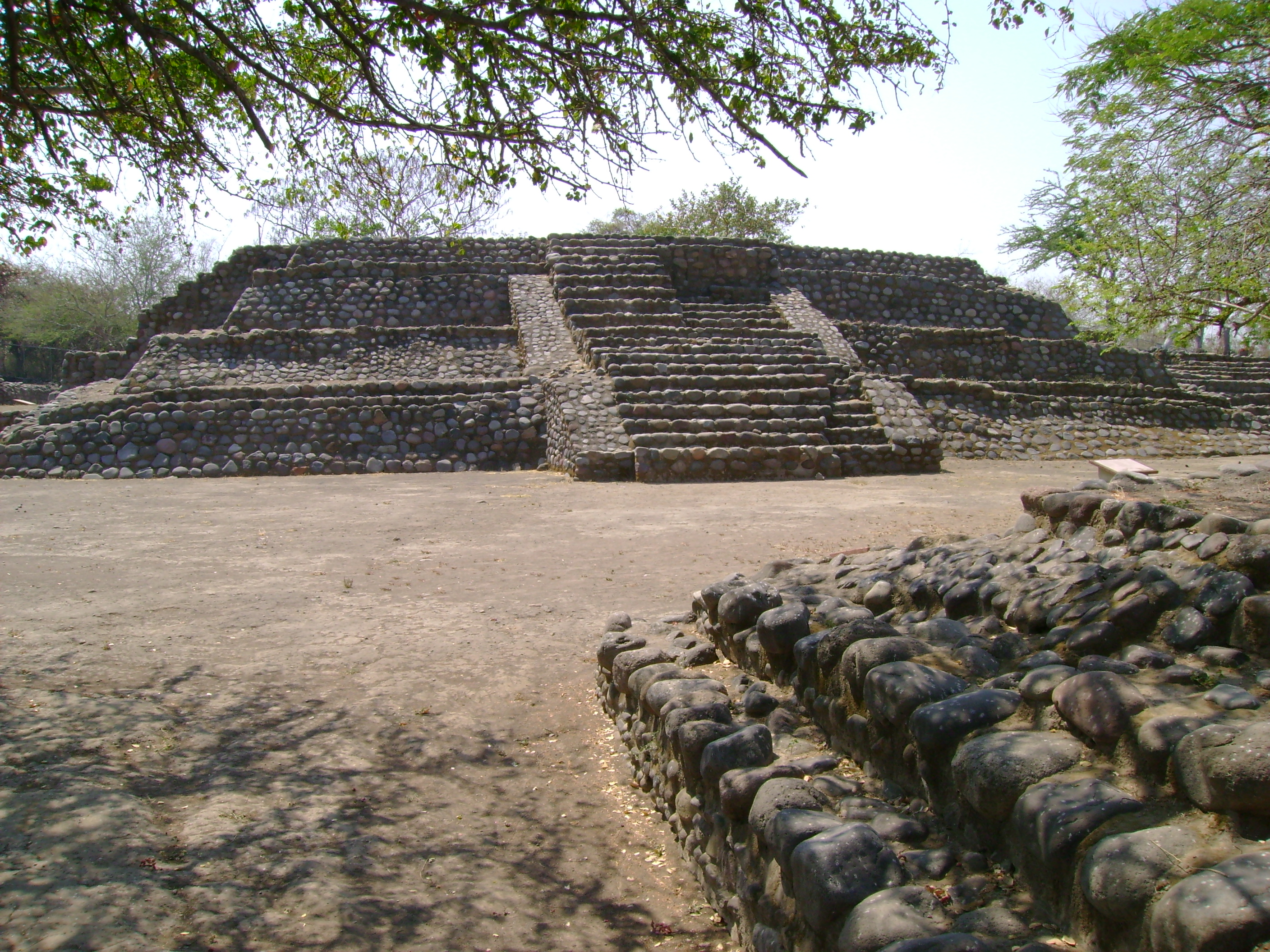 Estructura 5 de la Campana en Colima